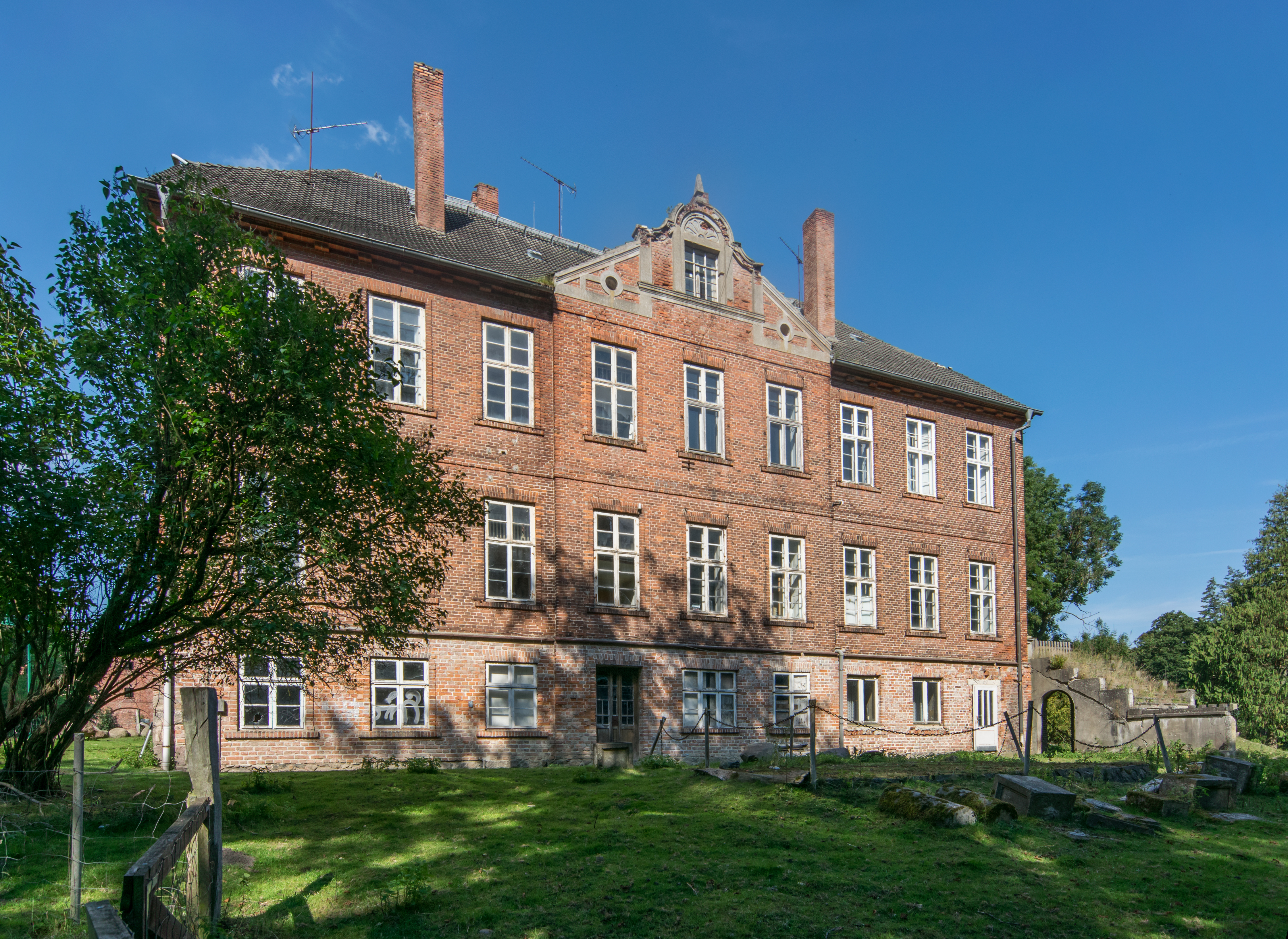 Reez Herrenhaus von Südwesten